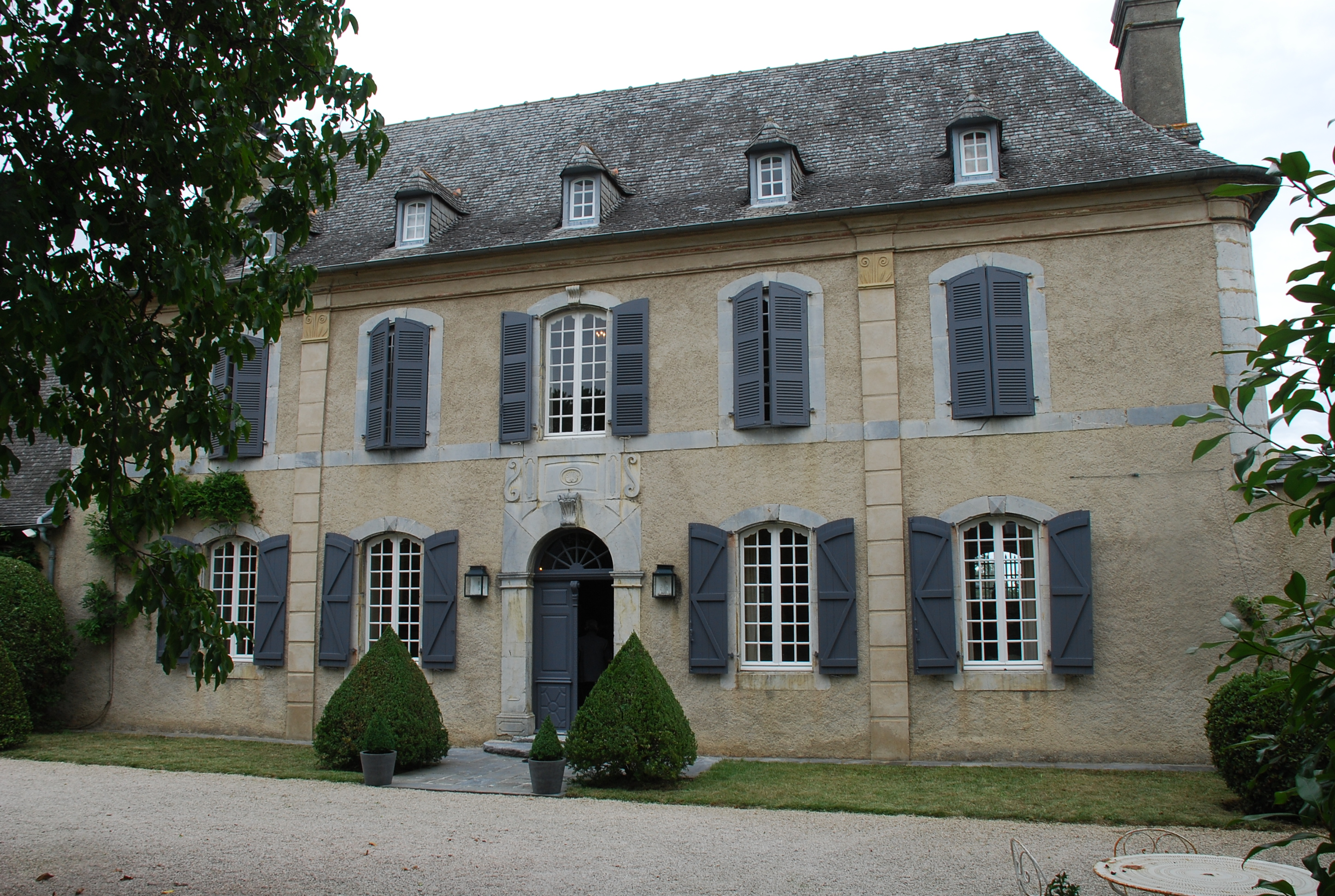 Maison du 18ème siècle classée aux Monuments Historiques à Azereix